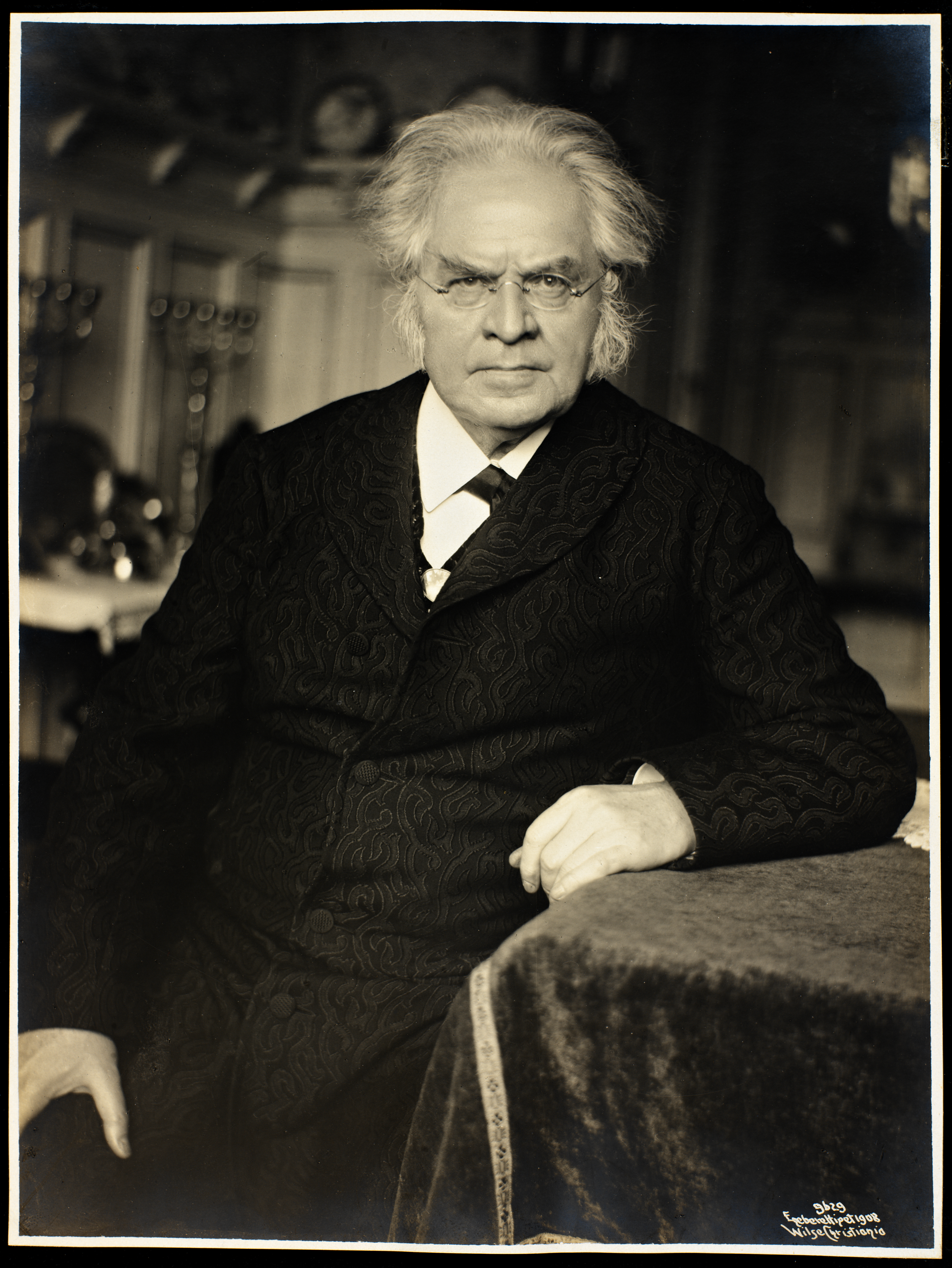 Bjørnstjerne Bjørnson, "Villa Sole", 1908.